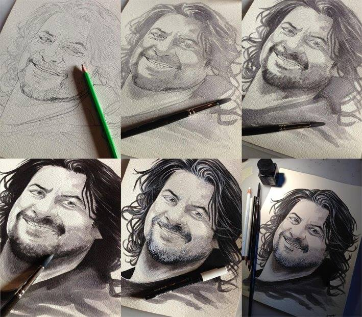 Work in progress del ritratto eseguito per Lillo (Pasquale Petrolo) usato per il film "Forever Young"